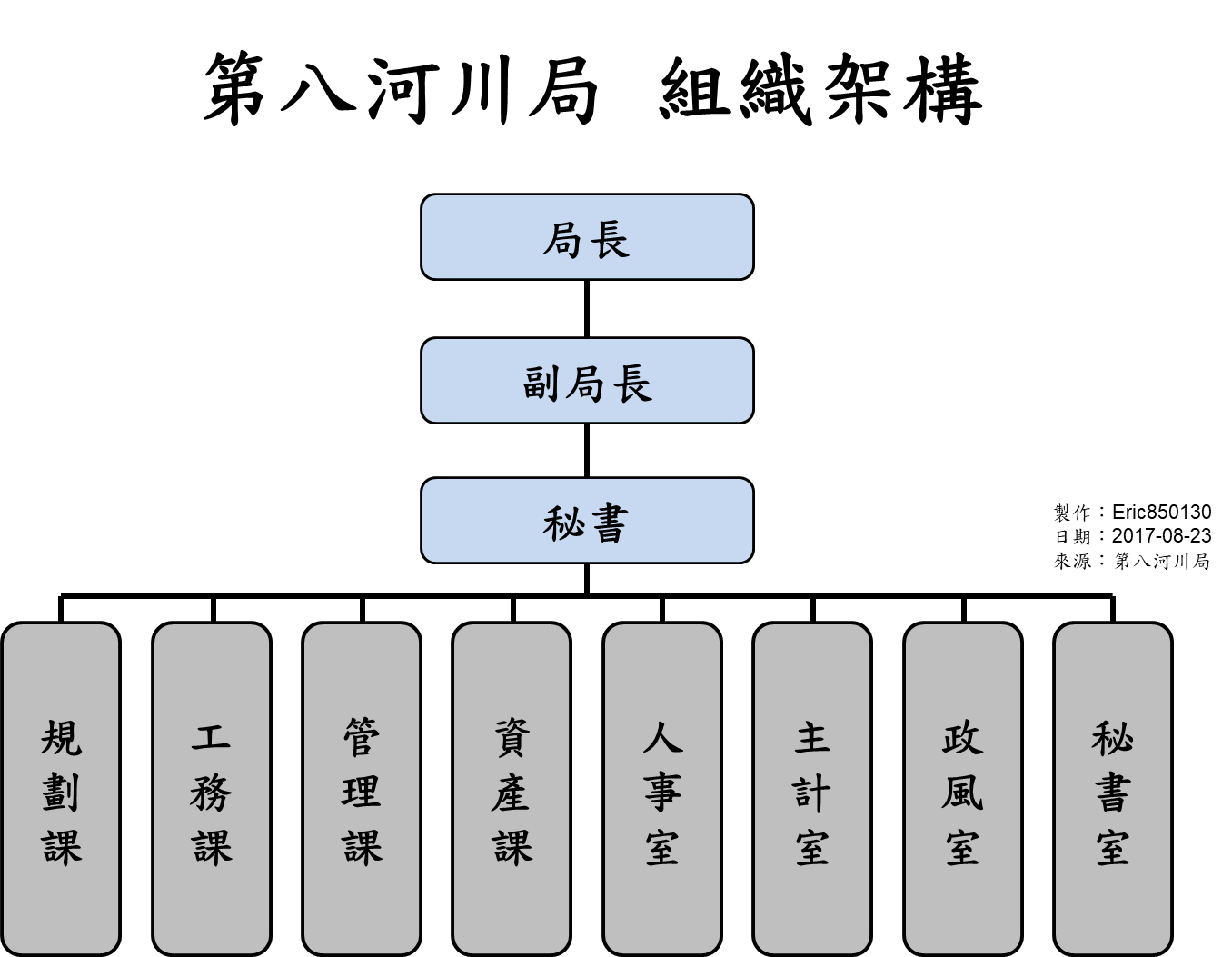 經濟部水利署第八河川局組織架構